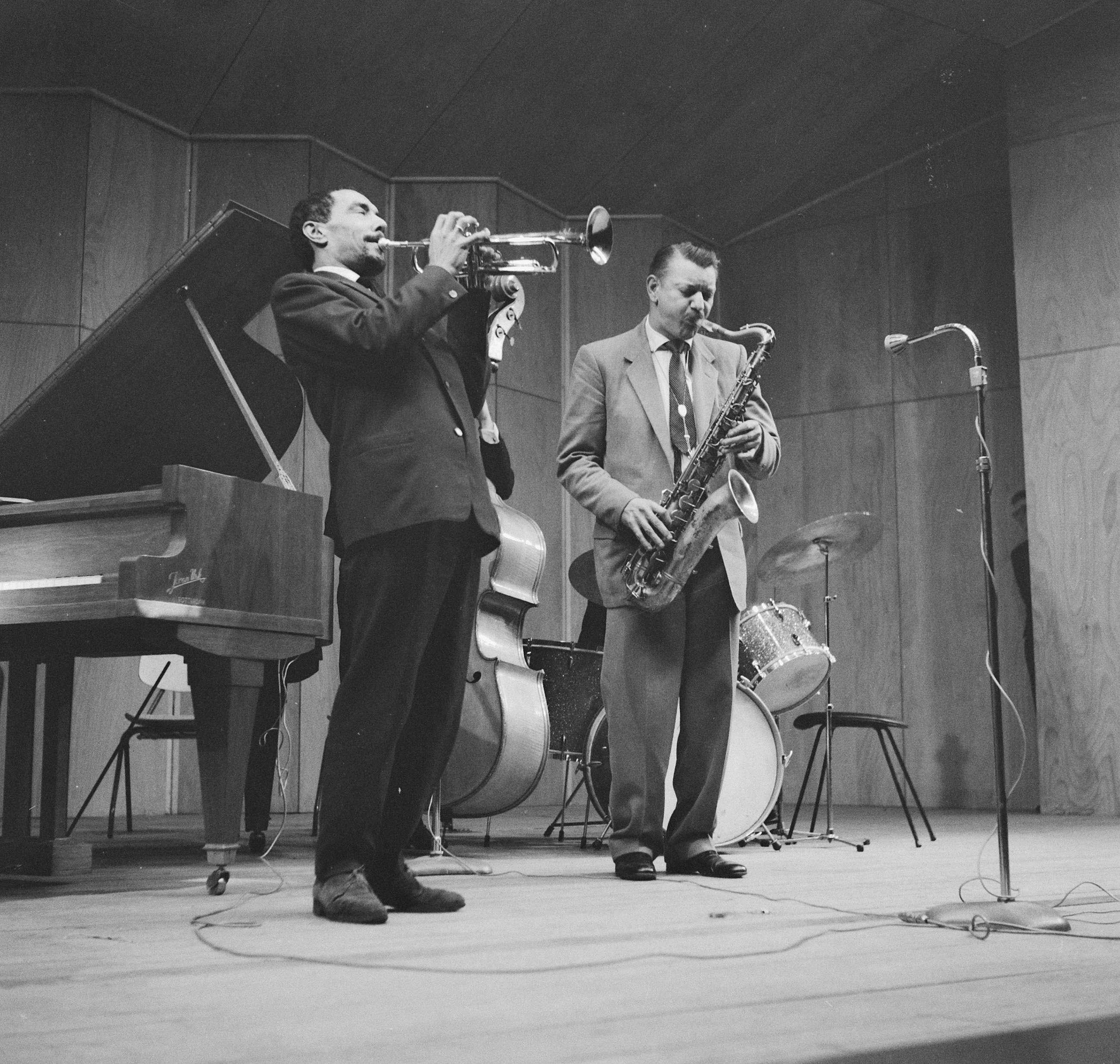 Jazz-concert AMVJ gebouw te Rotterdam (Nederland), 10 januari 1960. Trompet: Ado Broodboom (The Ramblers), saxofoon: Jack Sels